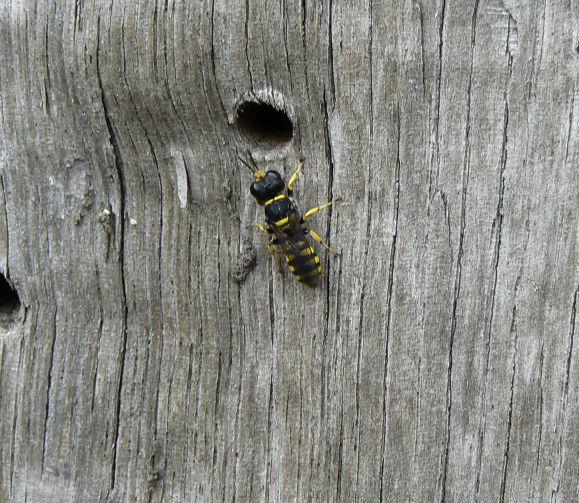 Ectemnius cephalotes bij nesting ang